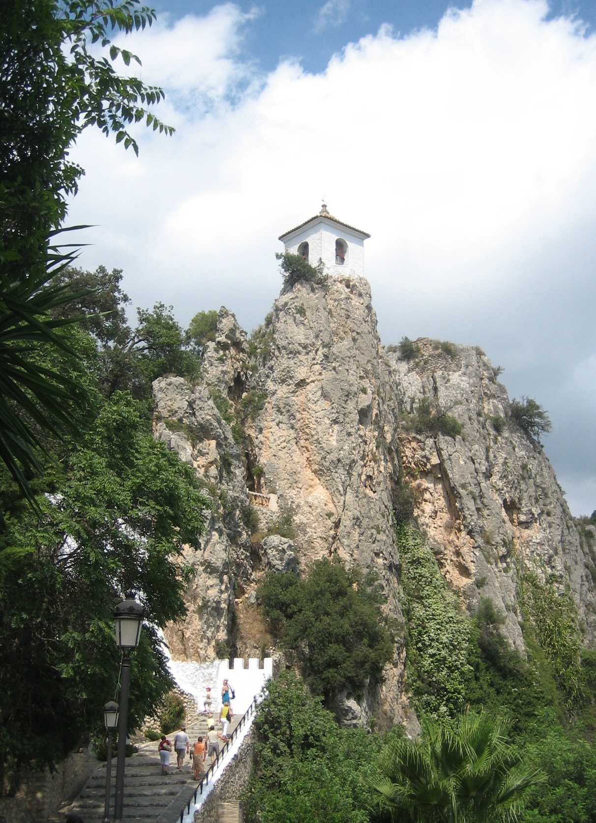 Vista de la localidad de Guadalest (provincia de Alicante, España). Fecha: 06/08/2006 Autor: Rodriguillo